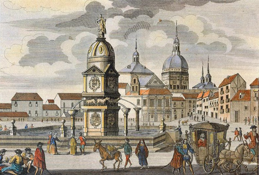 Fuente de la Plaza de la Cebada, Madrid, hacia 1665. Al pie de la imagen, a la izquierda se lee, "Fontaine et place de la Zevade a Madrid". La fuente fue obra de Pedro de Pedrosa y Martín Gortairi, según diseño de Juan Gómez de Mora y la escultura que la culminaba fue identificada como la diosa de La Abundancia.[1]